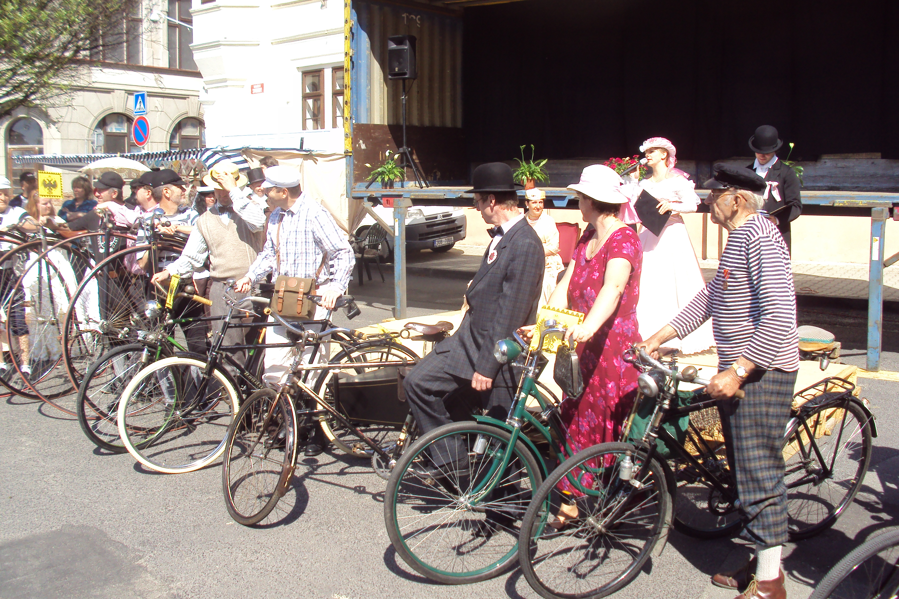 Součástí Zákupských slavností byla přehlídka starých kol